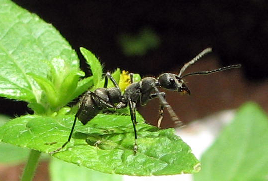 കട്ടുറുമ്പിന്റെ ചിത്രം. ക്യാമറ കാനൺ എസ്3.ഐ.എസ്